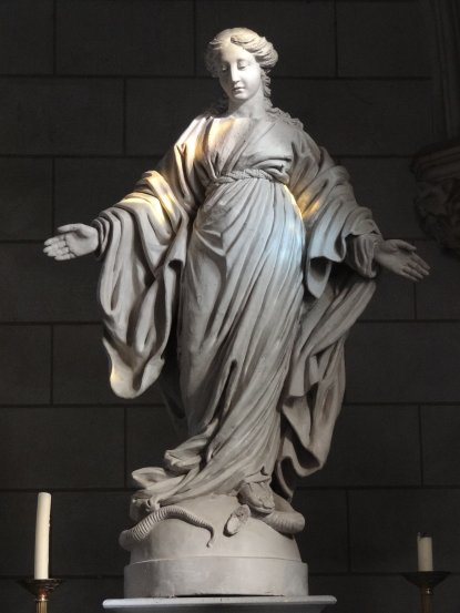 Eglise St Antoine, Statue Vierge Marie